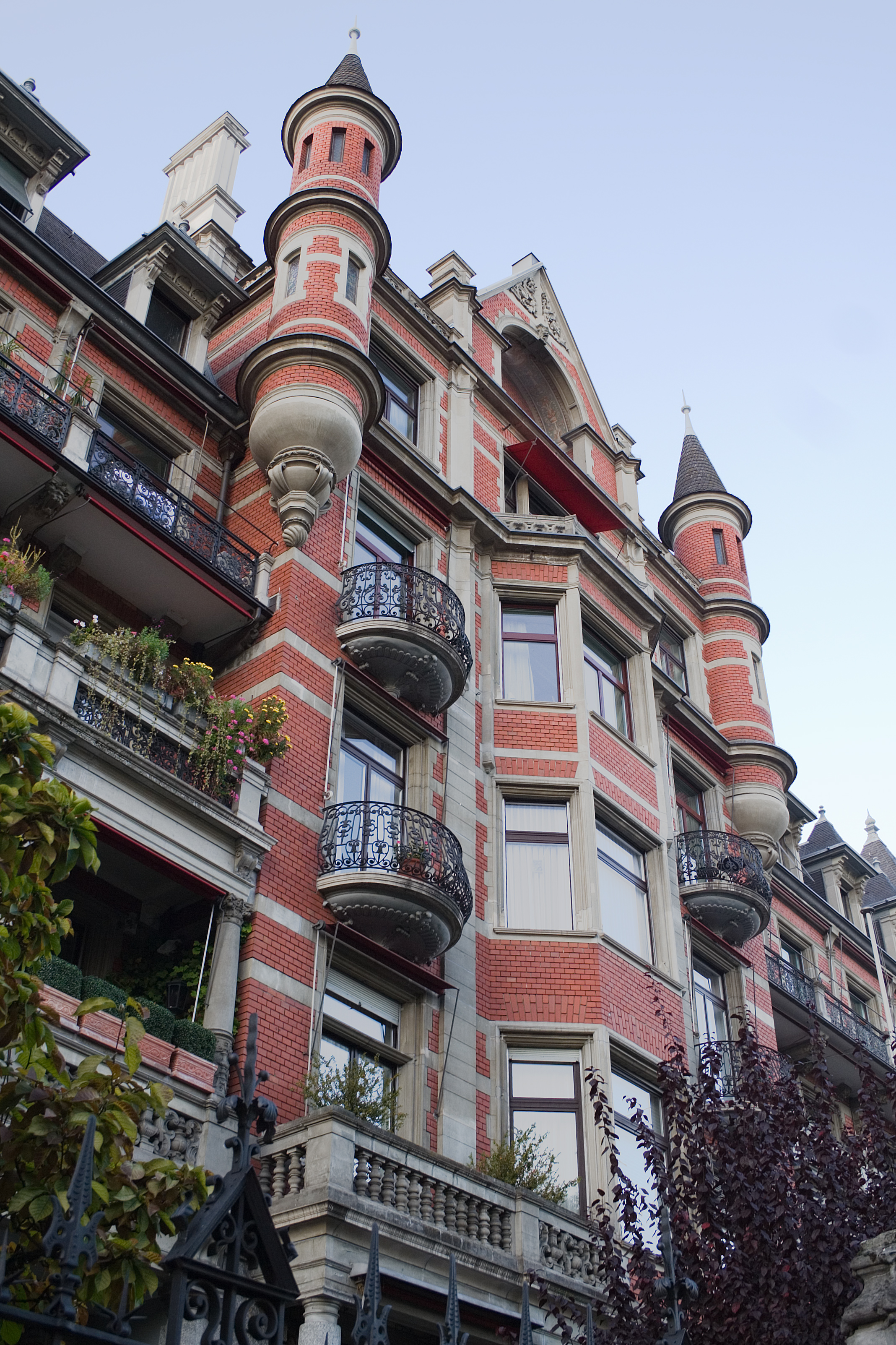 Das Rote Schloss an der Beethovenstrasse in Zürich, Schweiz Das Haus wurde 1991-1893 durch Heinrich Ernst (1846-1916) gebaut. Es besass eines der ersten Blockheizkraftwerke: Eine Dampfmaschine erzeugte Elektrizität, die Abwärme wurde zum Heizen genutzt. Von 1842-1970 befand sich im Haus der Sitz des SIA, Schweizerische Ingenieure und Architekten. Der SIA zog anschliessend ins SIA-Hochhaus um.